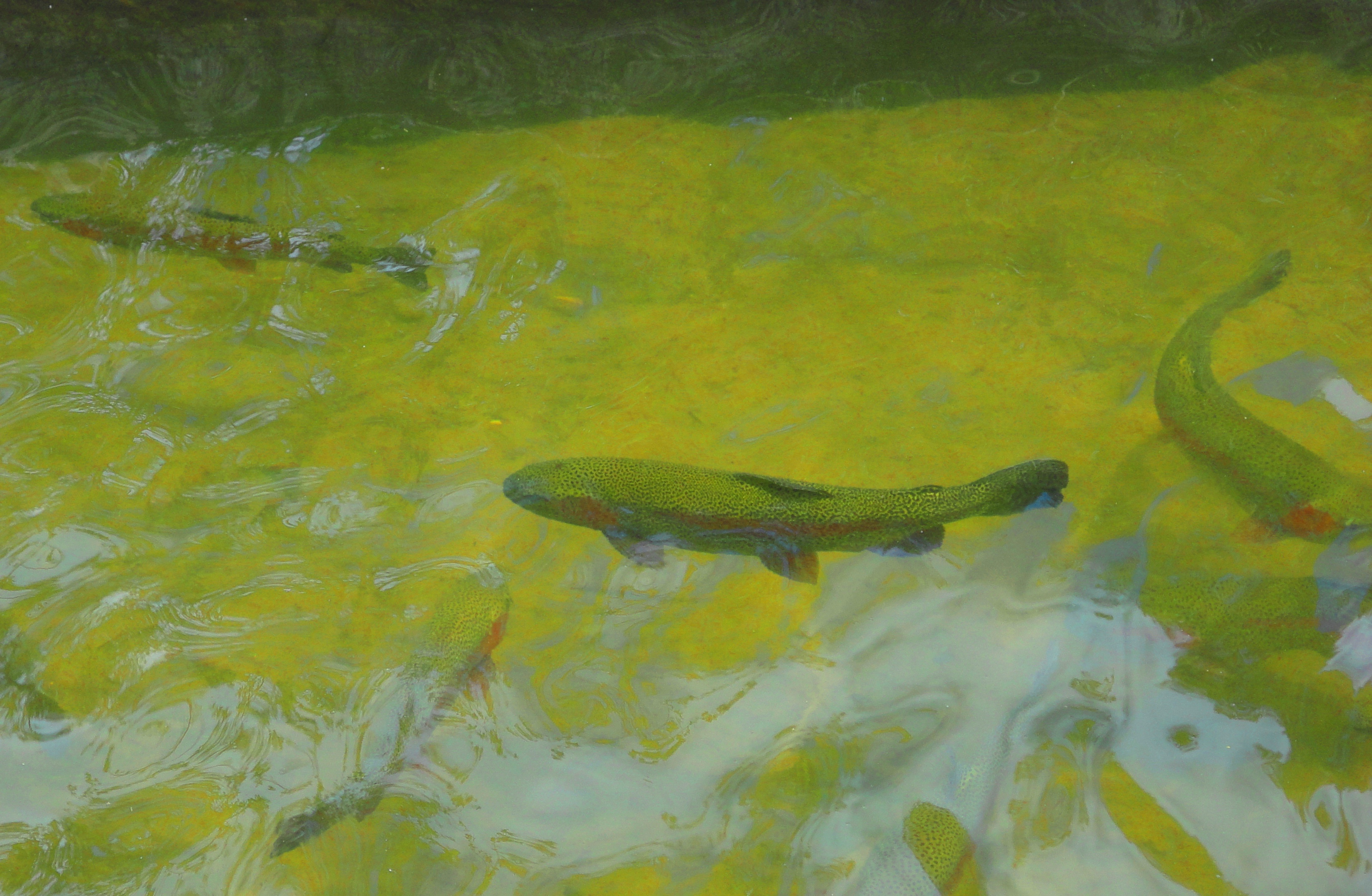 trucha y salmones de Masma